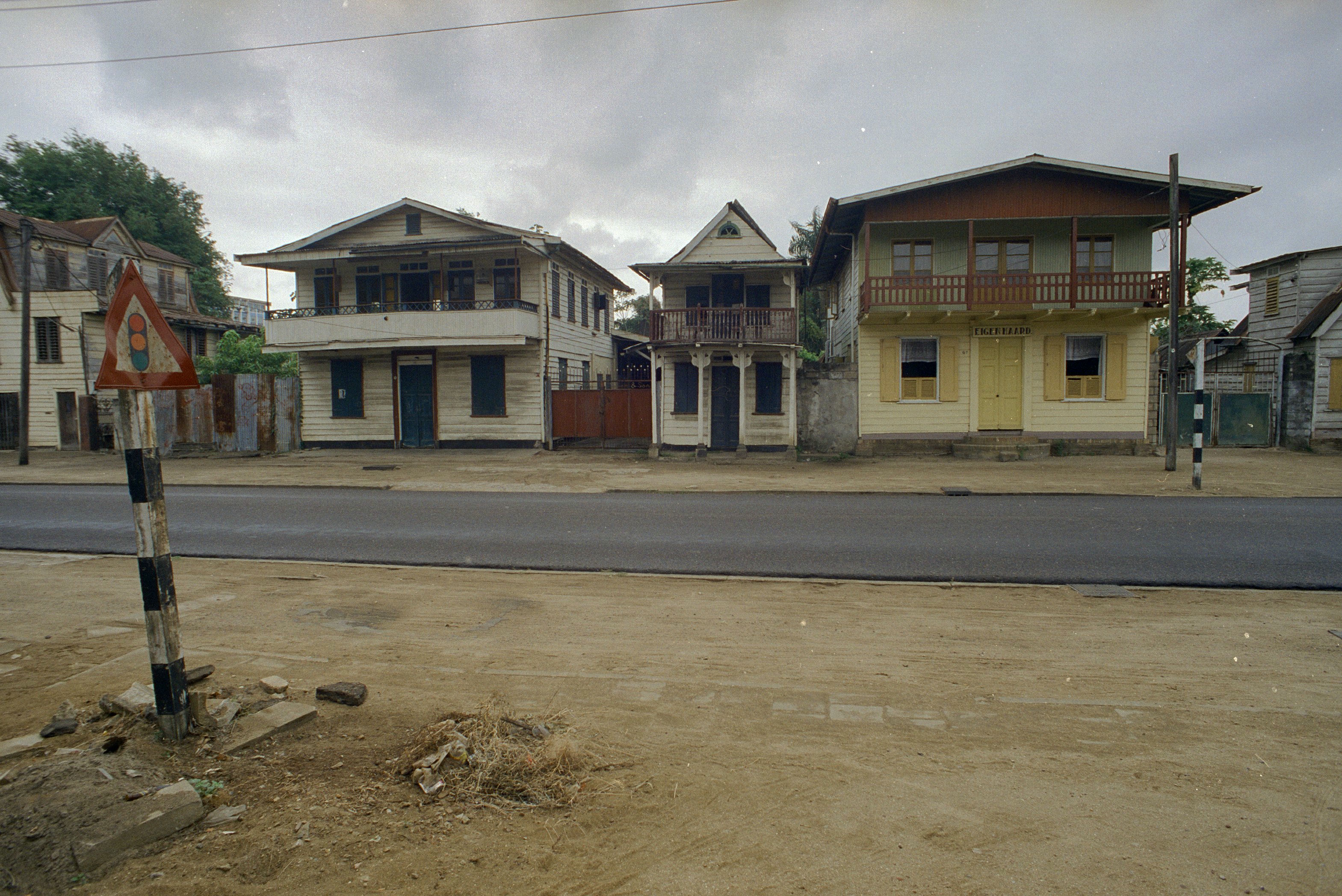 Koloniale geschiedenis: Vooraanzicht gevels (opmerking: Suriname reis Loek Tangel)